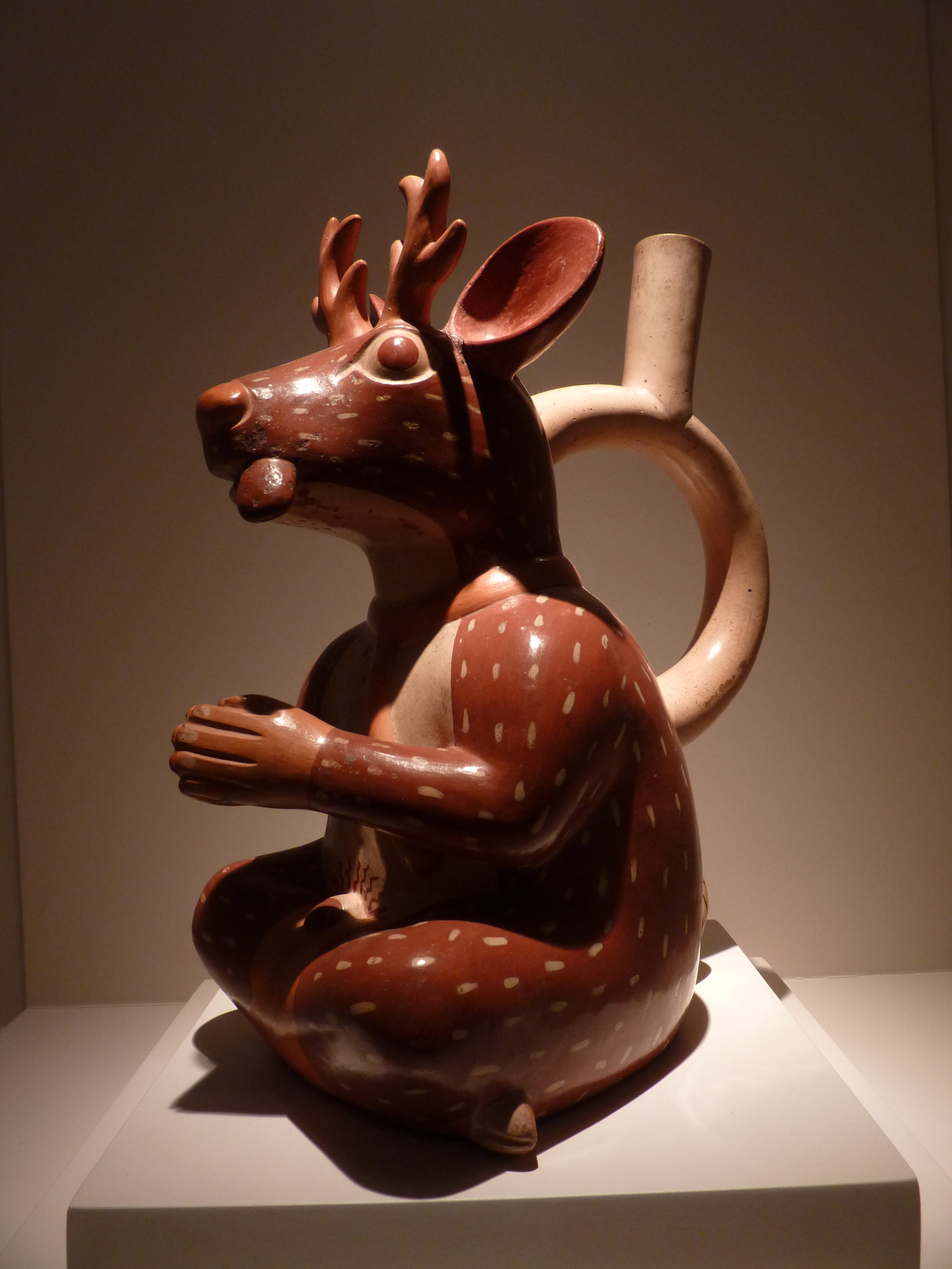 Museo de Arte Precolombino, Cusco